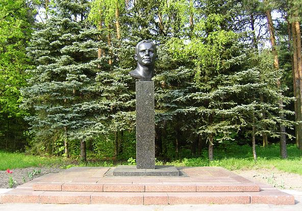 Территория академии. Стела Ю.А. Гагарина